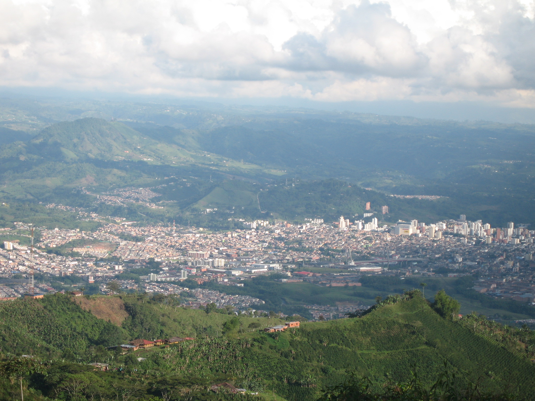 Helecho cuando esta naciendo